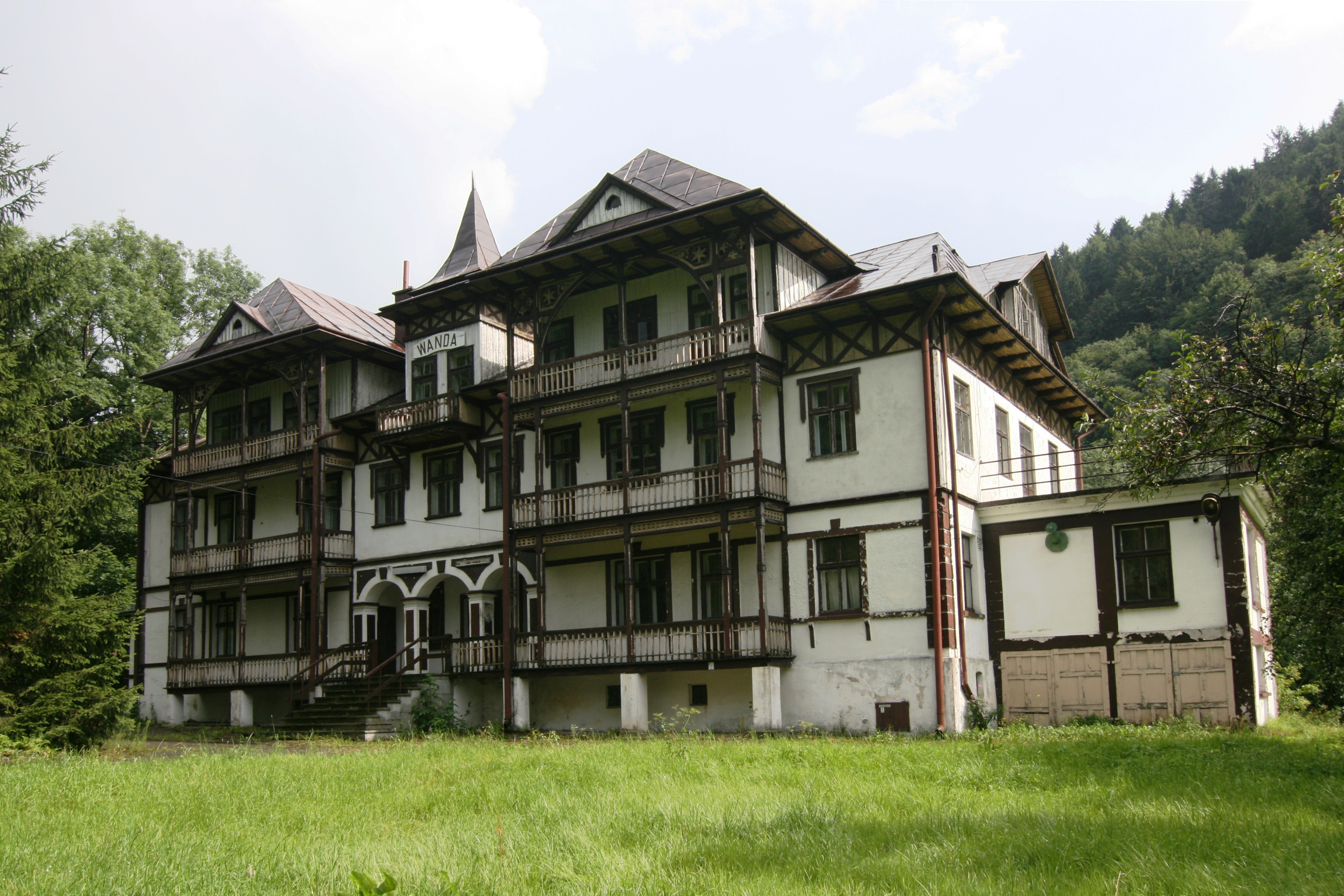 Szczawnica, ul. Główna 25 - Willa Wanda